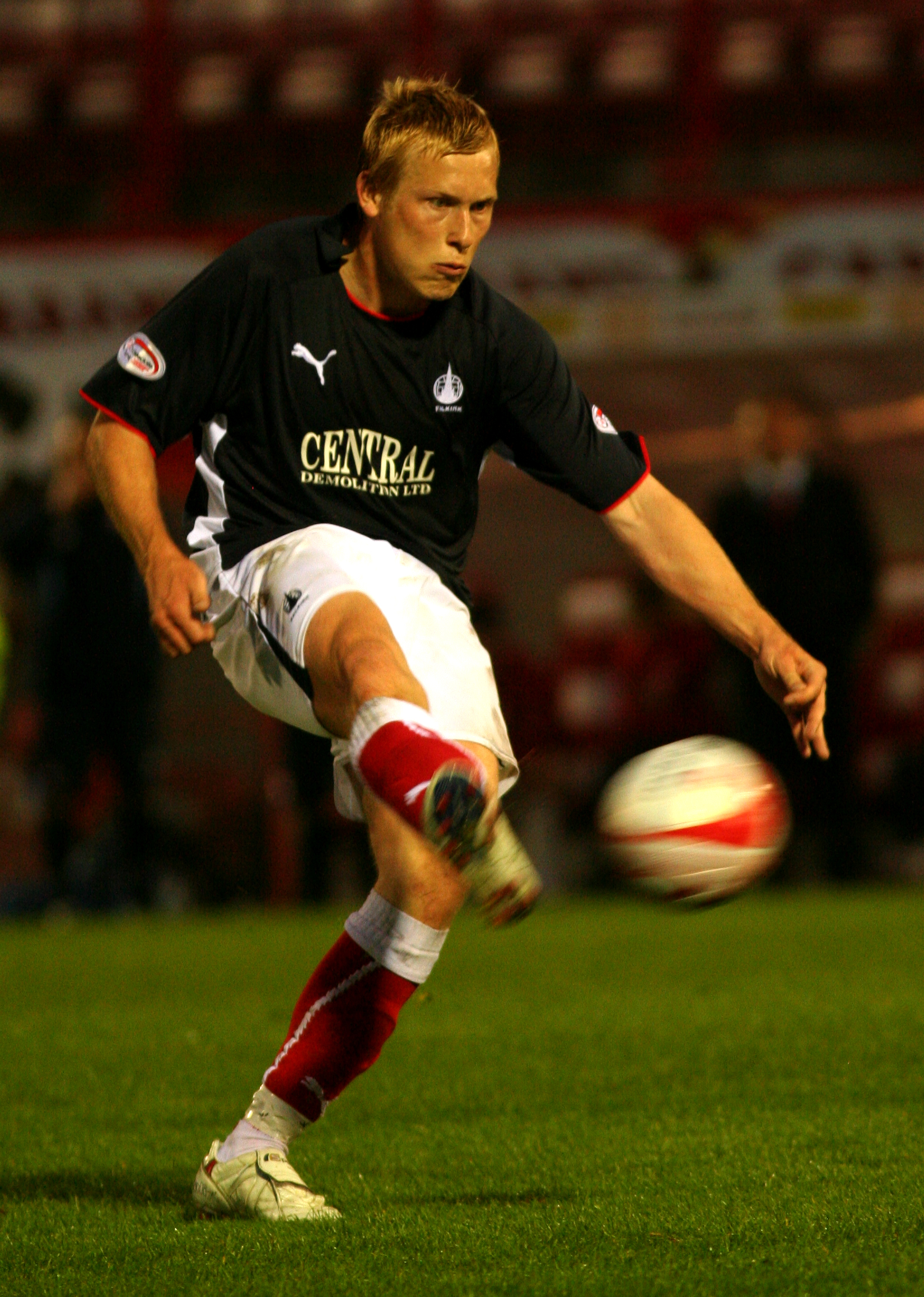 Scott Arfield for Falkirk